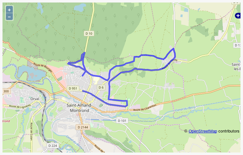 Carte OpenStreetMap. Le tracé est représenté en bleu. Réalisé avec Cyclograph 1.7.1